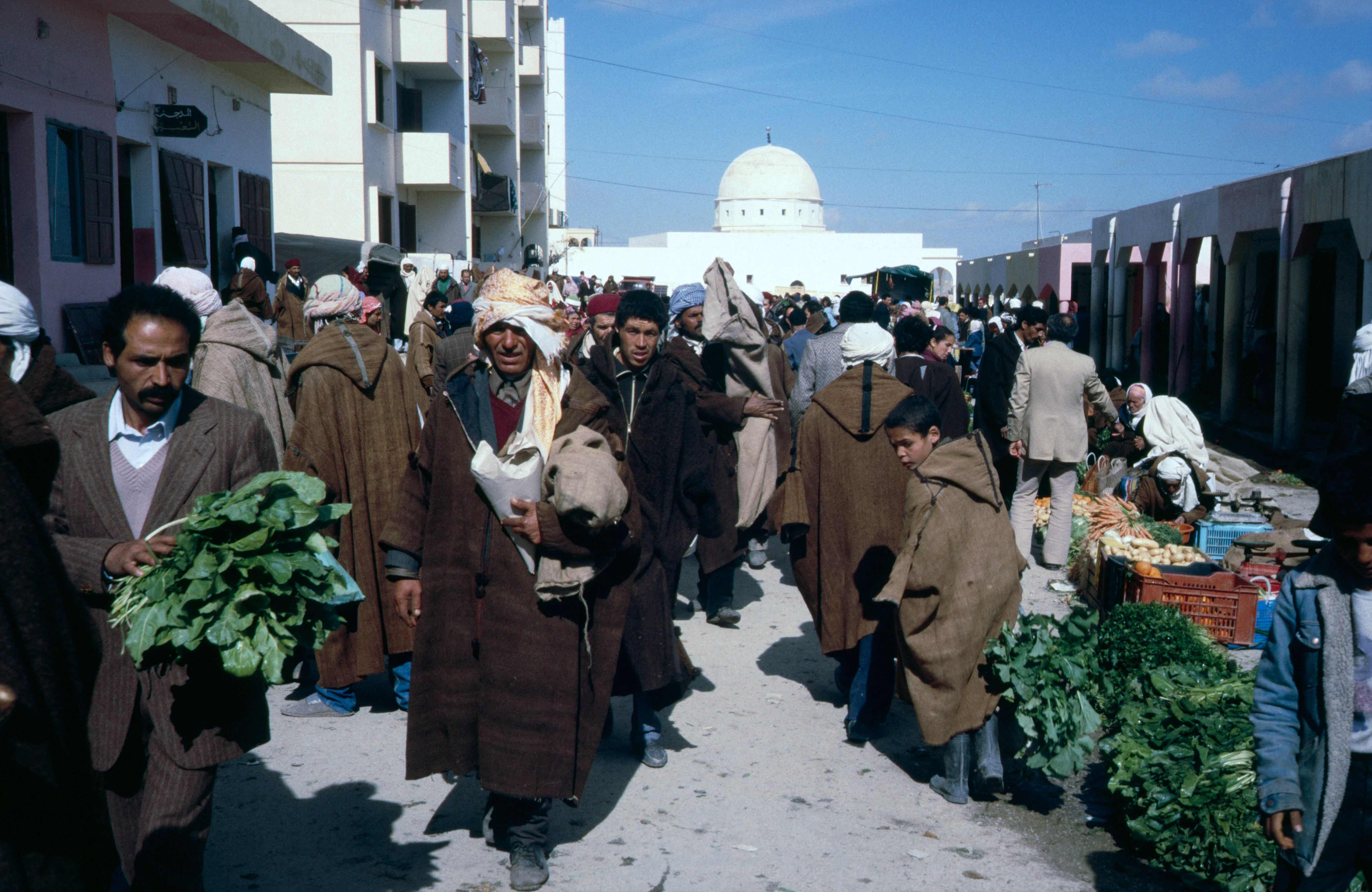 Der Marktplatz in Maktar 1